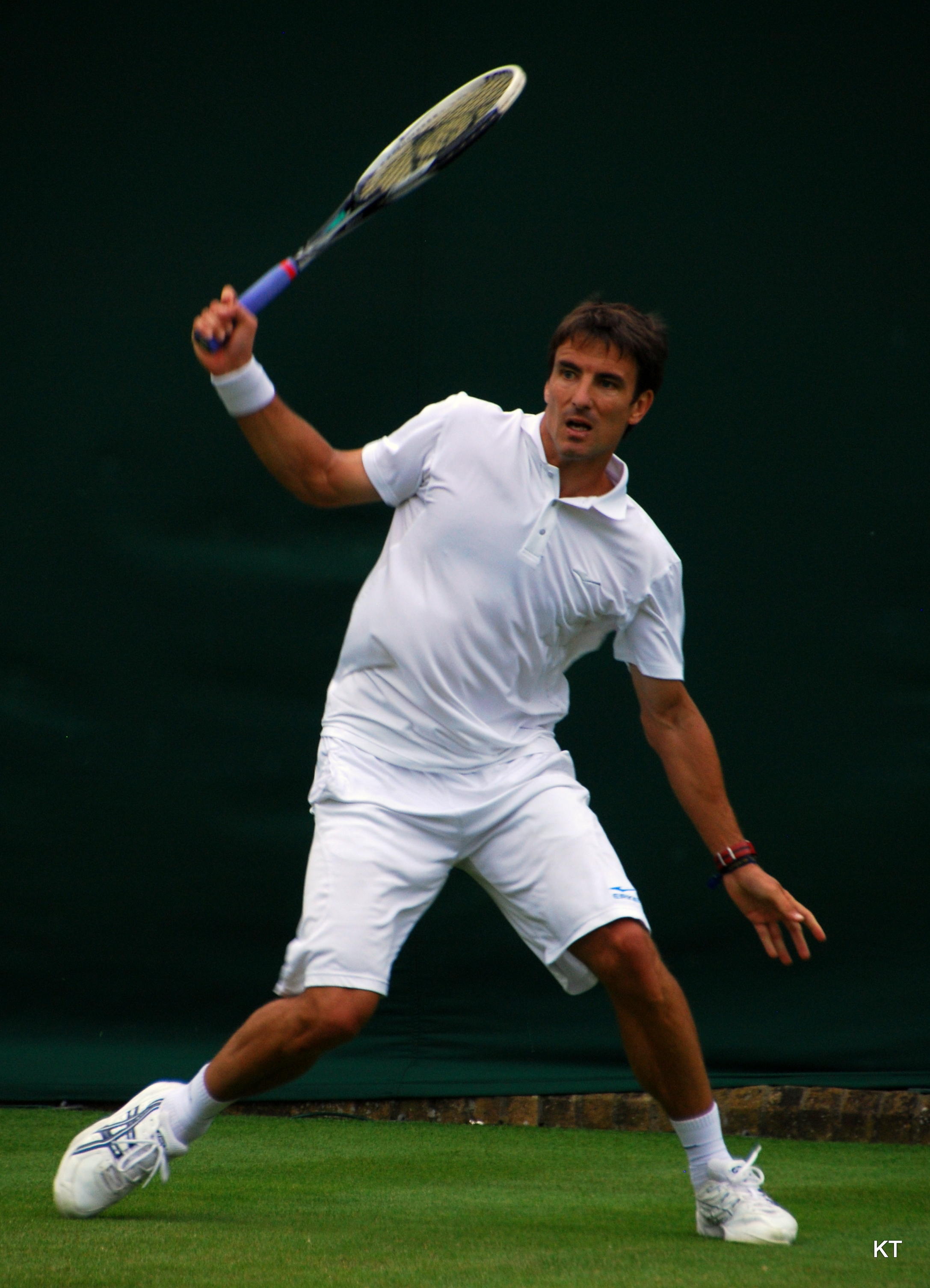 Tommy Robredo